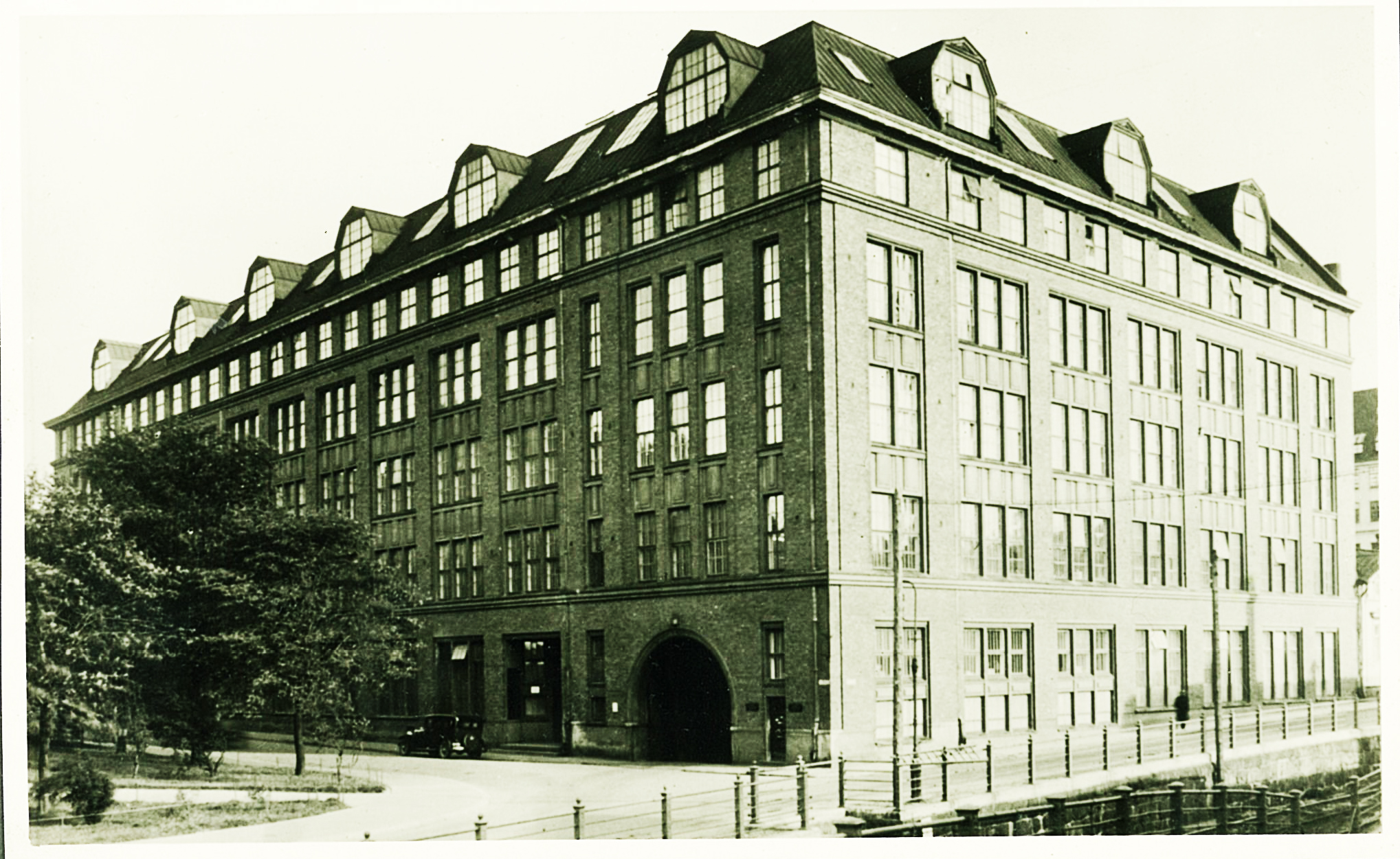 Kuva Novitan ensimmäisistä toimitiloista sen perustamisvuodelta 1928. Suomen Kaapelitehtaan ensimmäinen tehdasrakennus tunnetaan nykyään nimellä Merikortteli